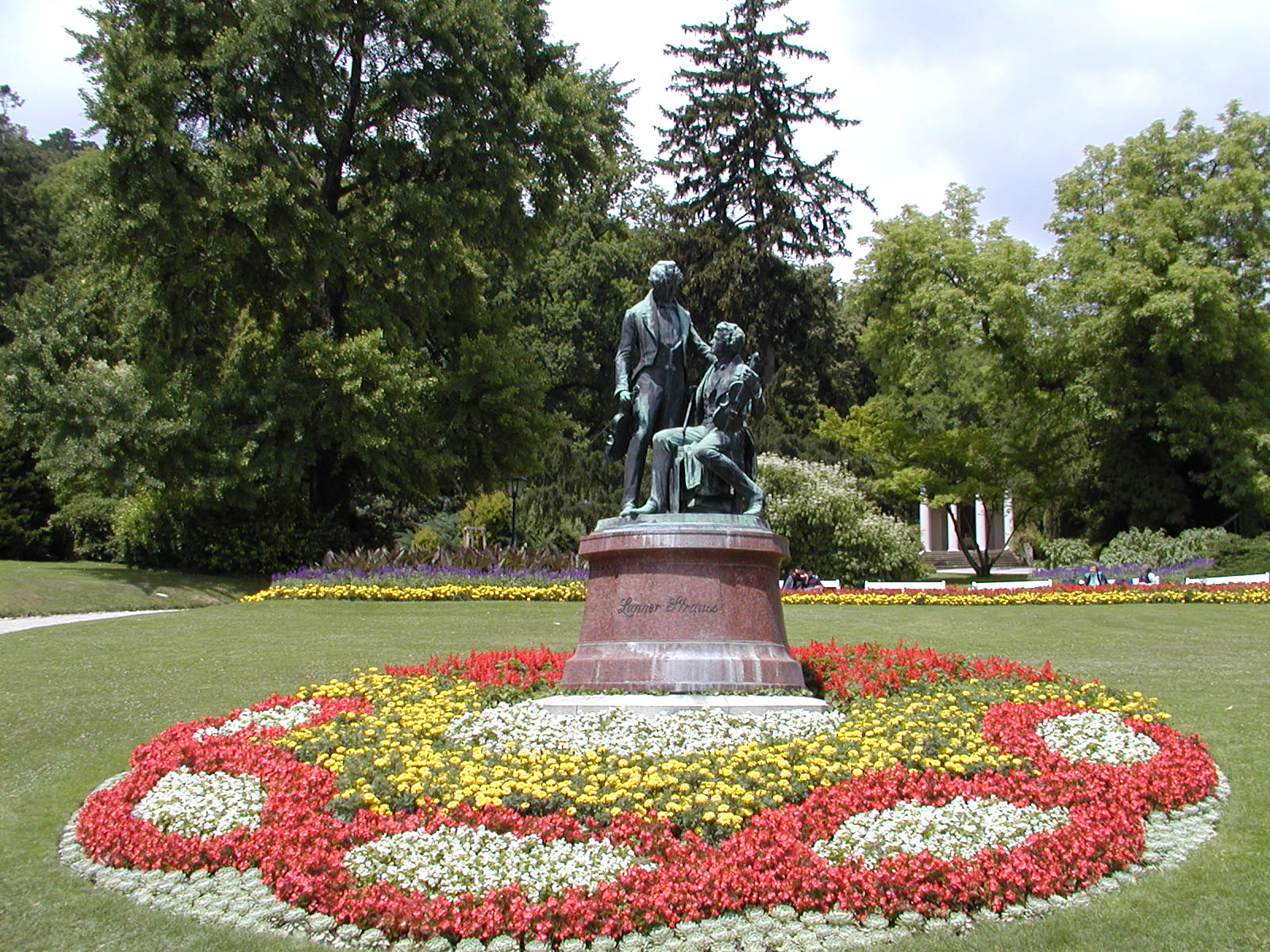 Beschreibung: Lanner&Strauss Denkmal im Badener Kurpark, 2003-07-06 Quelle: selbst fotografiert Fotograf: Andreas J. Resch Kategorie:Bild:Denkmal